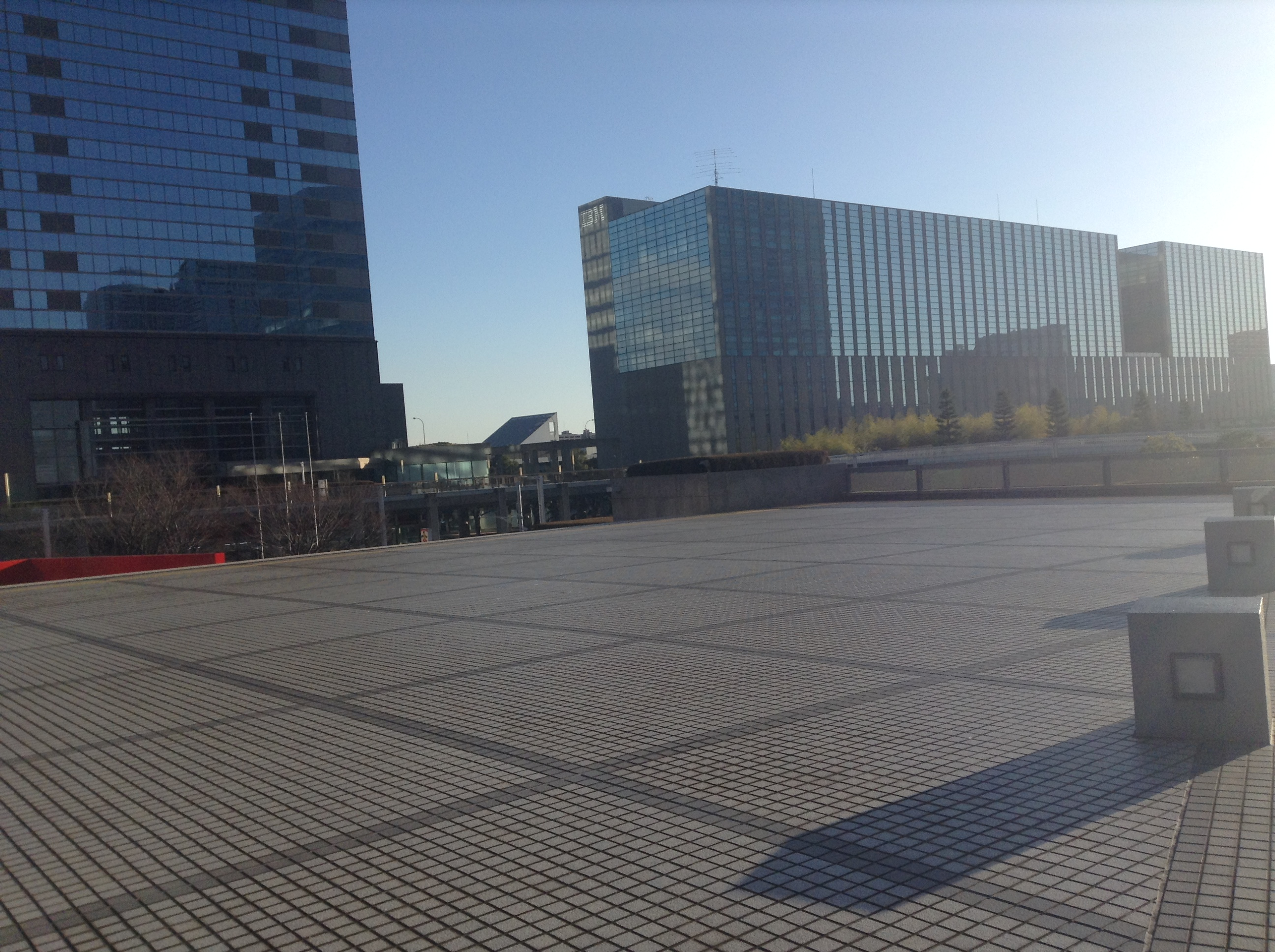 二人セゾンのミュージックビデオが撮影された NTT幕張ビルのエントランスから見たIBM幕張の風景